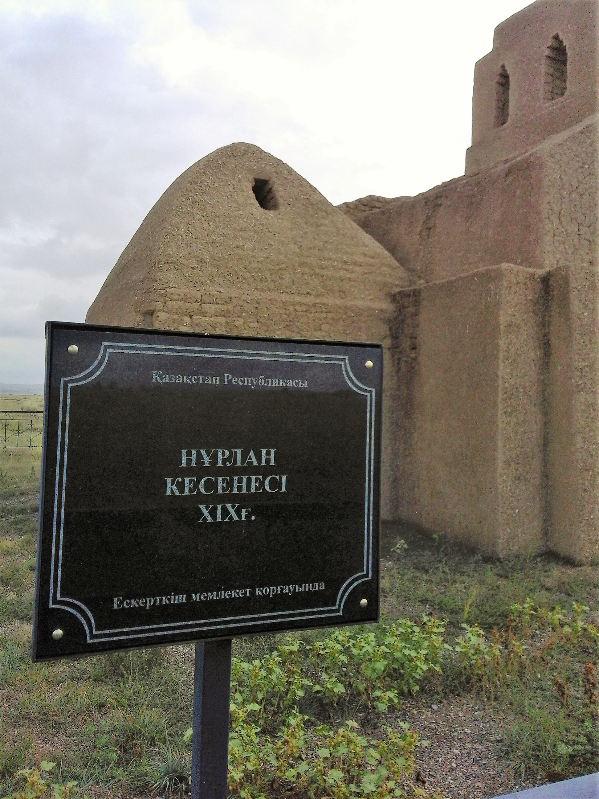 Мавзолей волостного управителя Нурлана Байсеитова, указатель